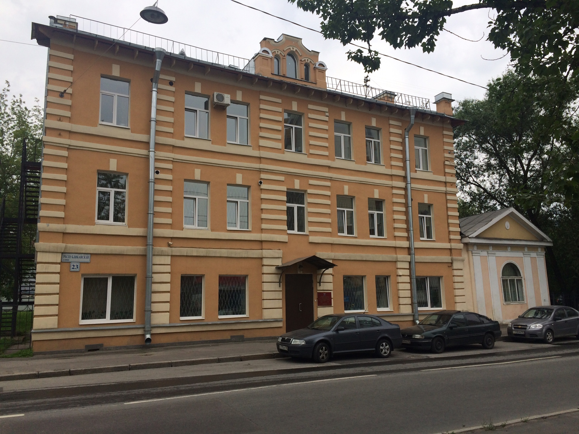 Здание бывшего Сиротского приюта Охтинского братства (1915)